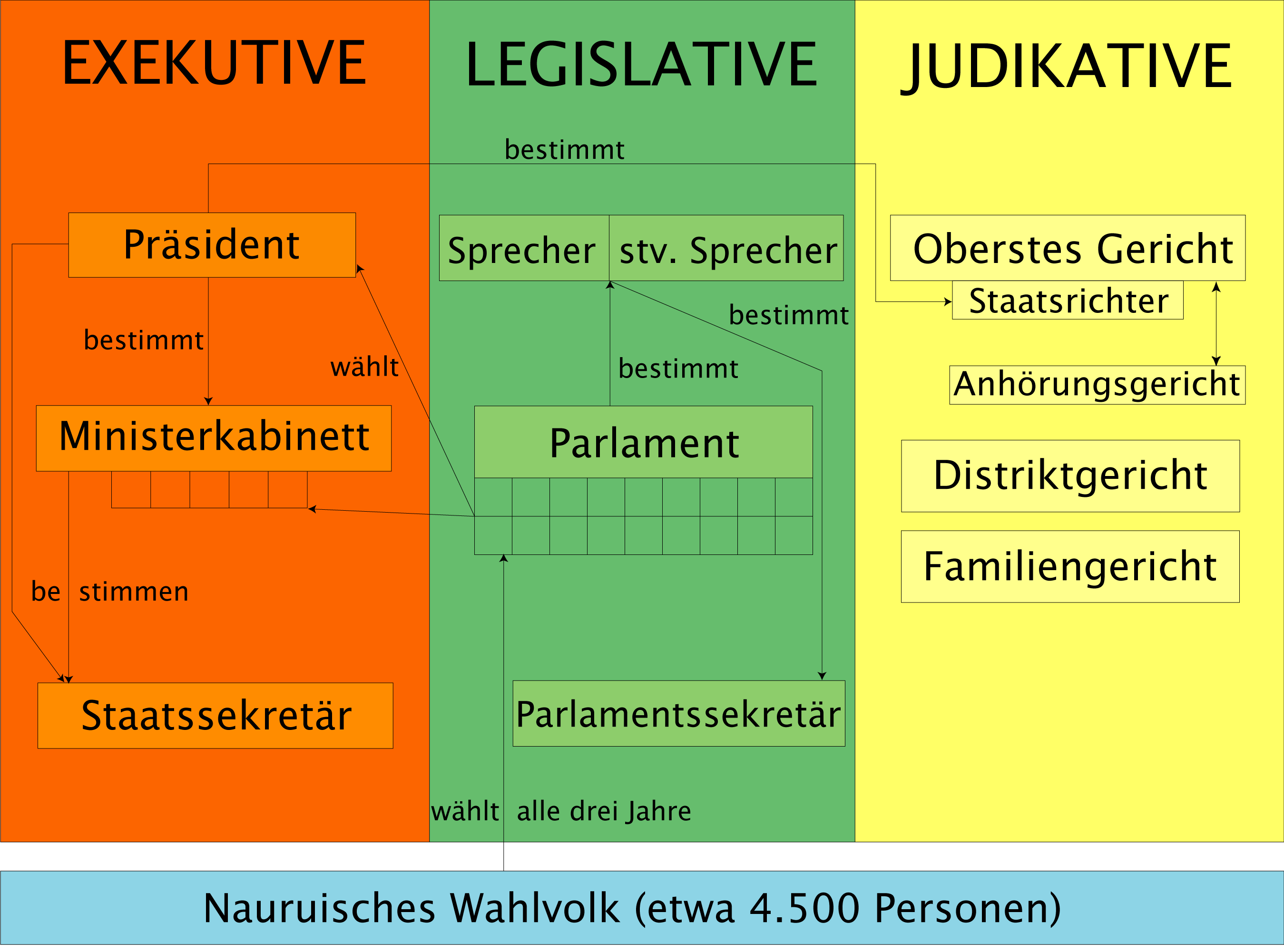 Selbst erstellte Grafik der nauruischen Gewaltenteilung